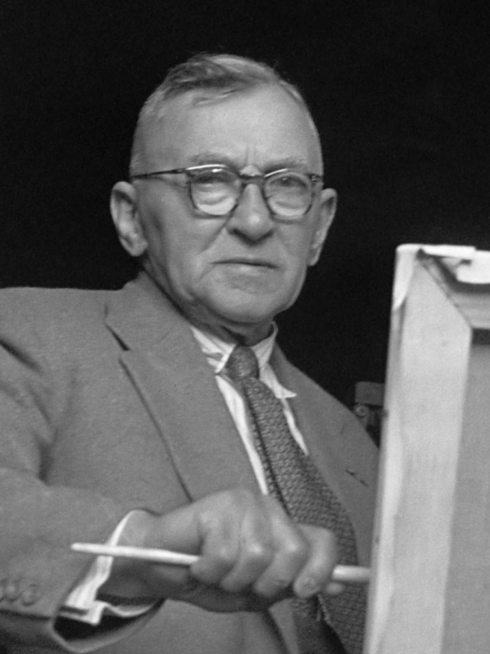 David Schulman, landsschap- en stadsgezichtschilder, hoopt op 31 oktober 1956 zijn 75ste verjaardag te vieren. Hij is tevens oud-voorzitter van "Arti et Amicitiae". Schildert vanuit z'n atelier de herfstkleuren 23 oktober 1956